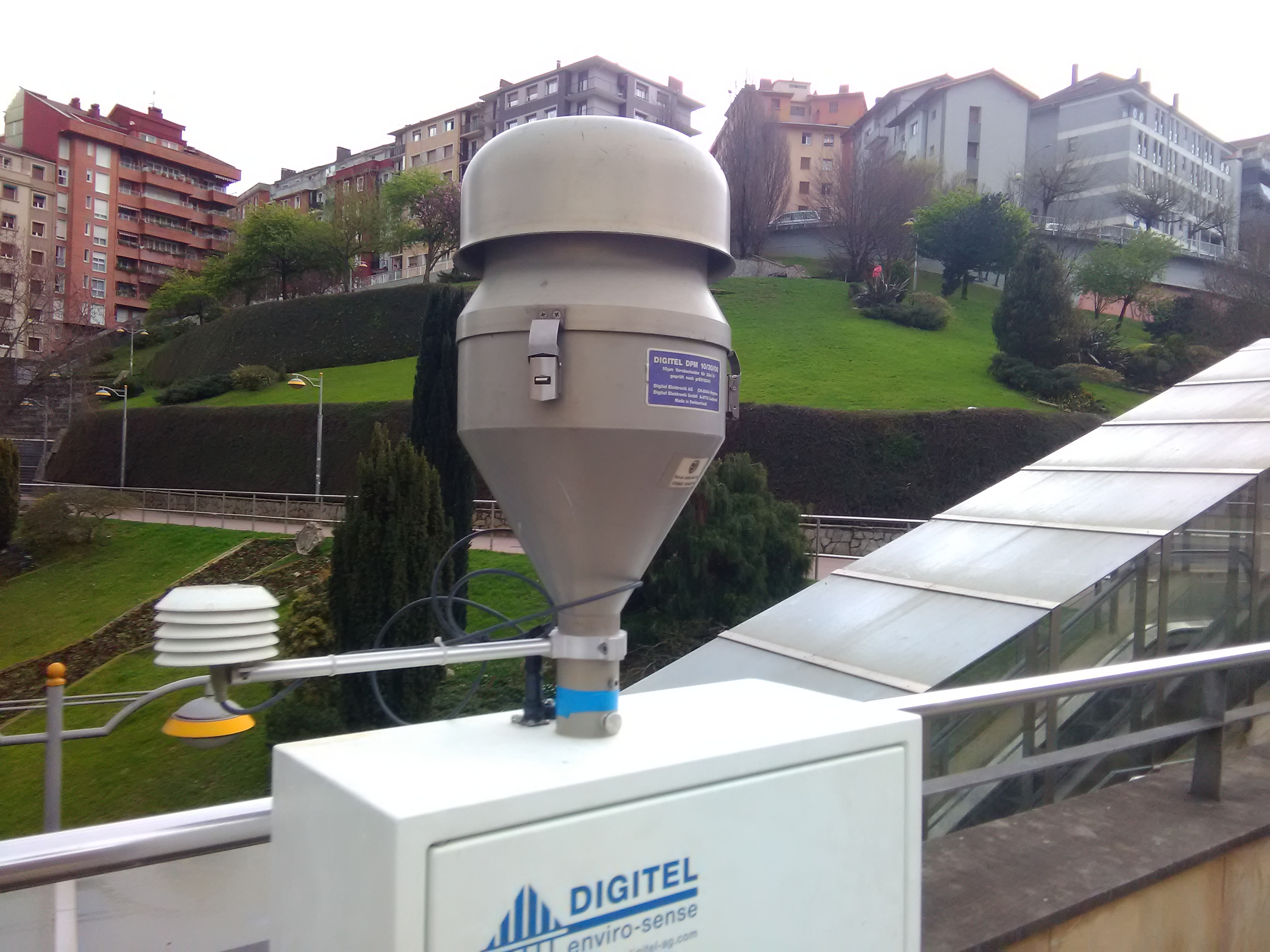 Zaldibarko zabortegiaren hondamendiarengaitiko aire neurgailua, Eibarko Untzaga Plazan. Atzean, Txaltxa Zelai parkea.